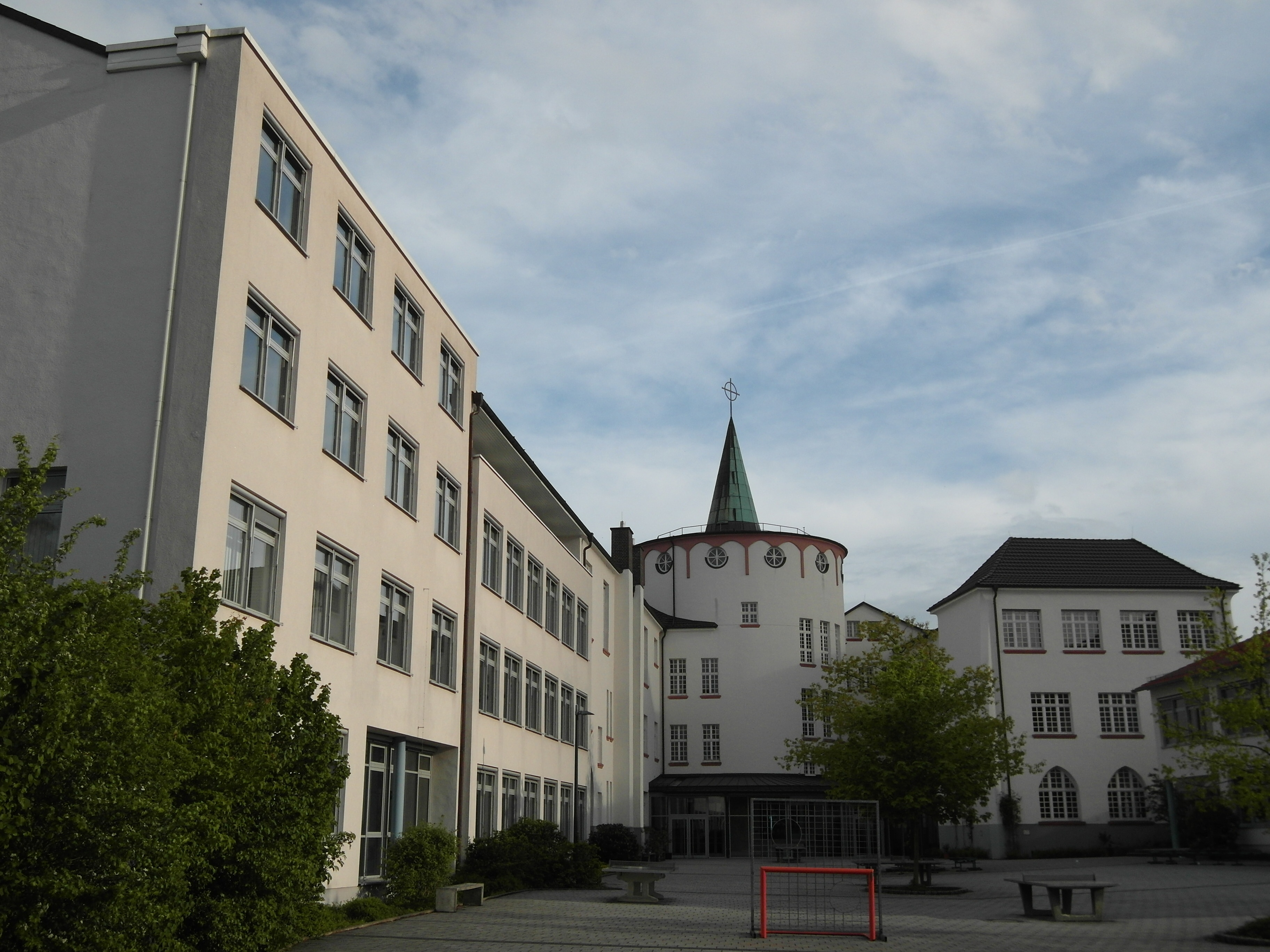 Dieses Foto zeigt den Ost- und den Westflügel des Augustinushauses, sowie das Liboriushaus der Schulen der Brede.